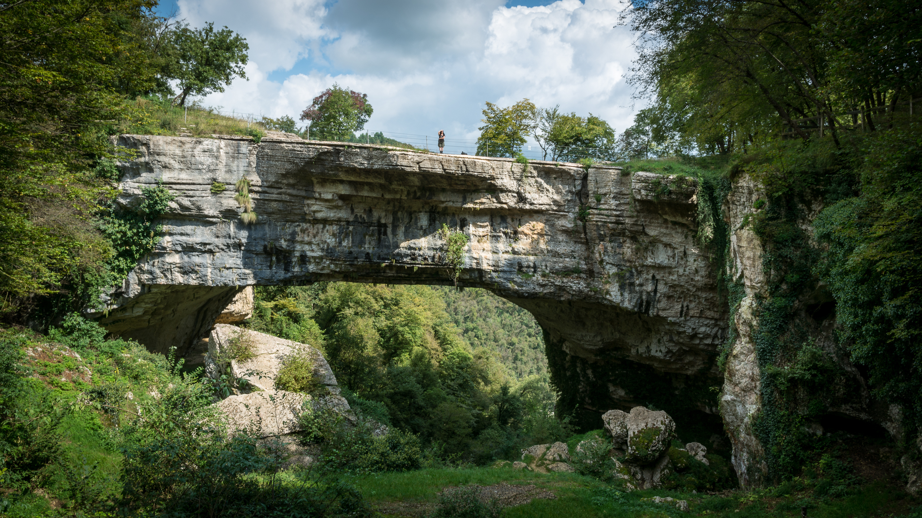 Die Ponte die Veja bei Sant’Anna d’Alfaedo in Venetien, Italien.